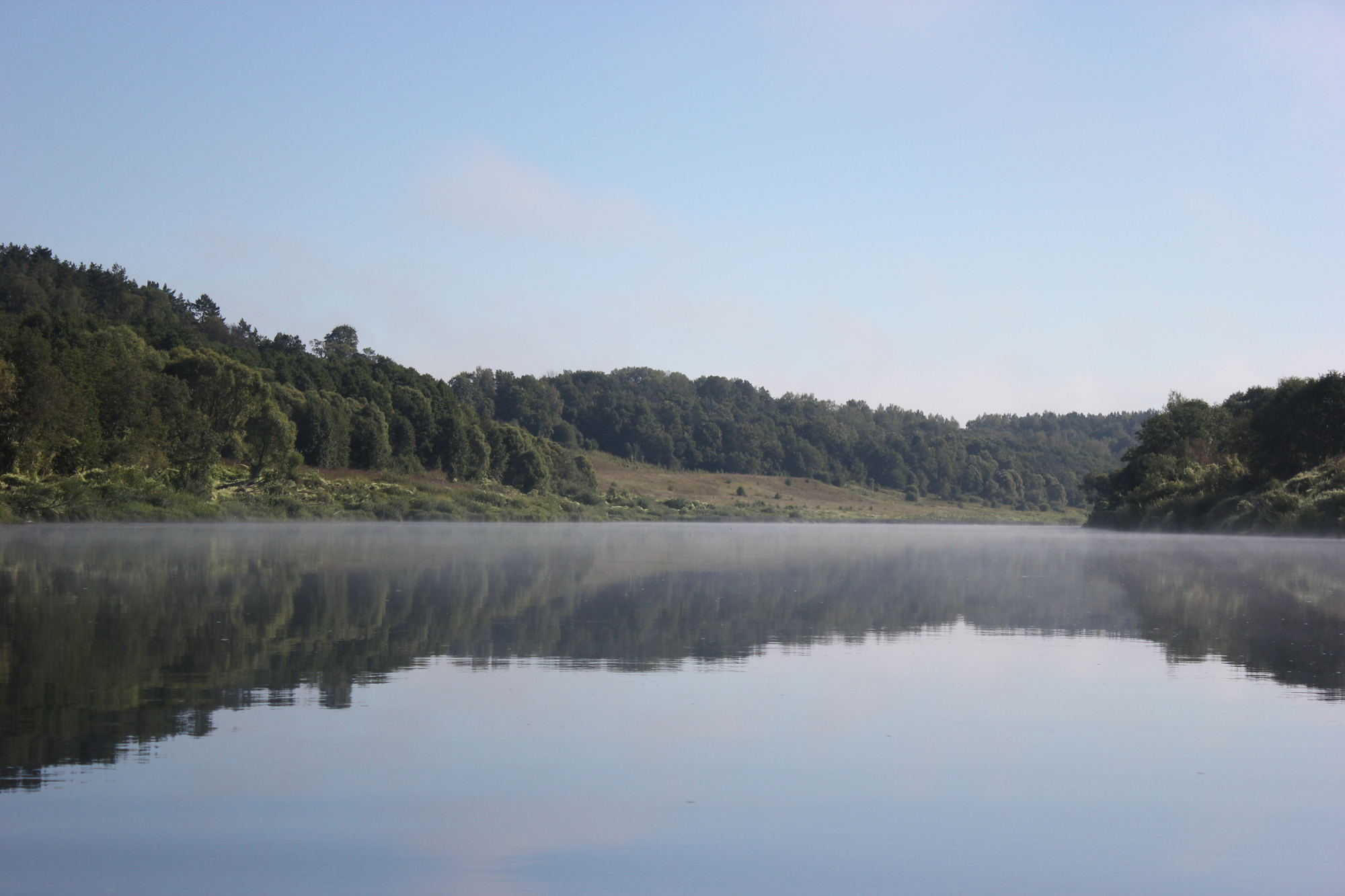 Почти идеально ровным зеркалом лежит утренняя Угра, пока ещё не начался дневной ветерок. This image is related to the protected area of Russia number 4000001